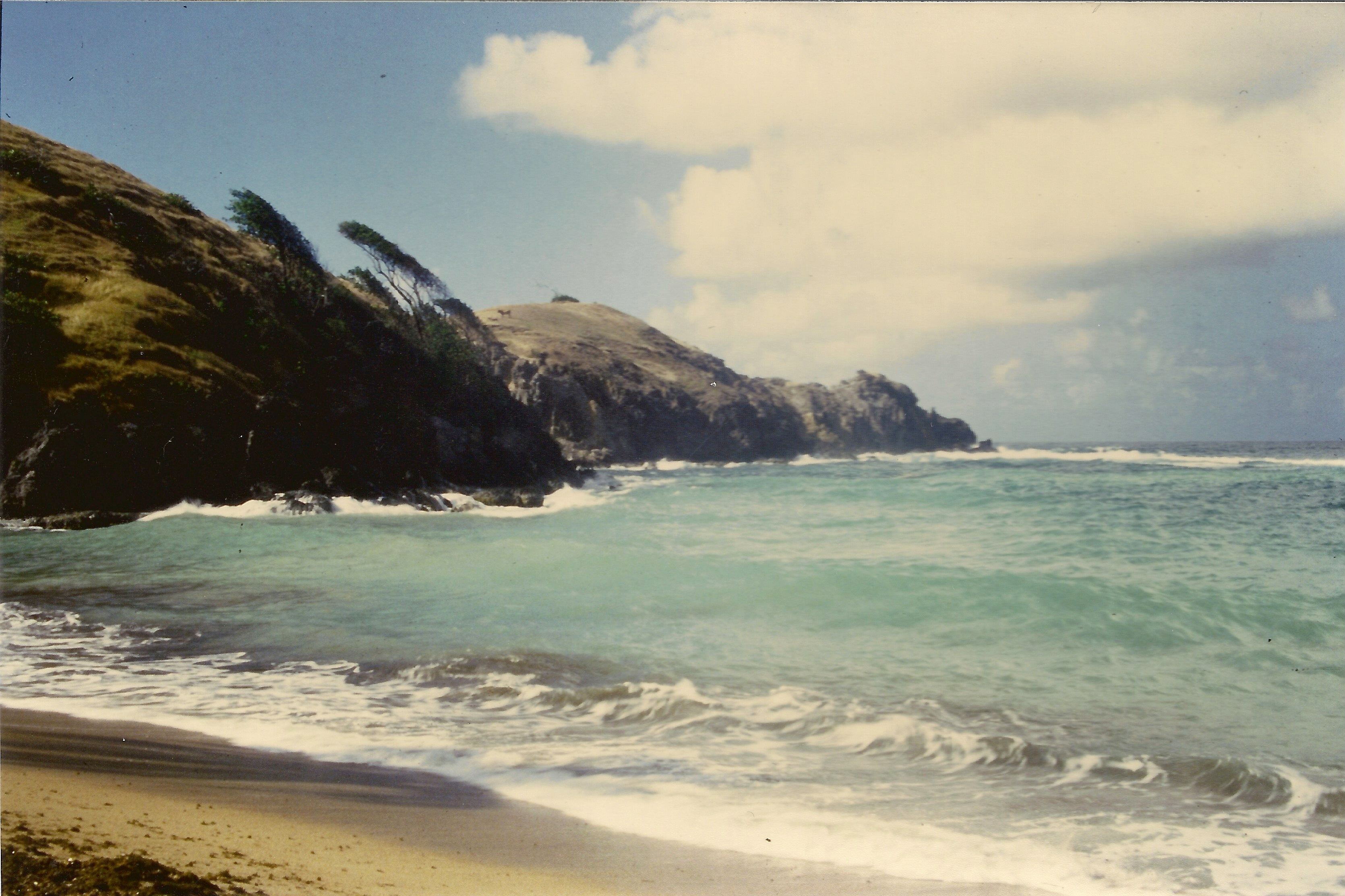 Anse L'Etang